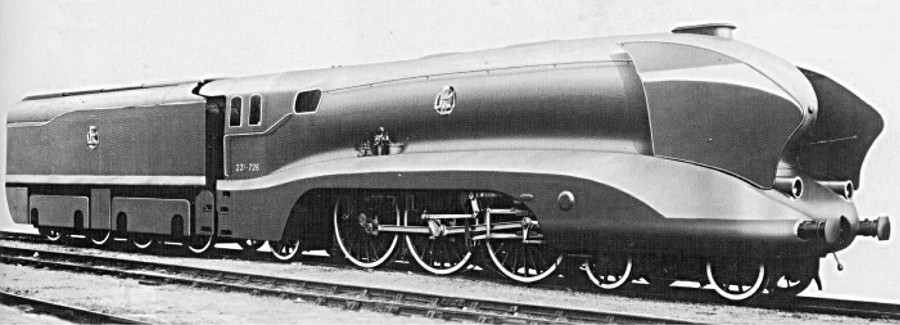 Locomotive PO 231 726 après carénage.